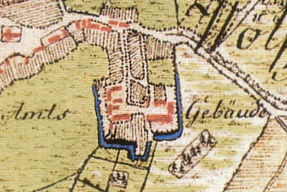 Plan von Wölpe 1778